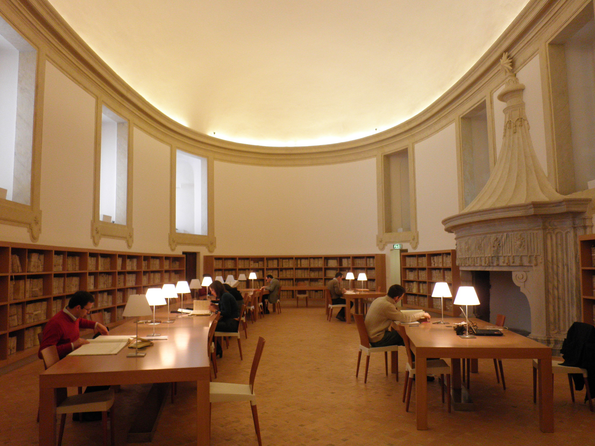 Roma, Archivio Storico Capitolino, sala di lettura